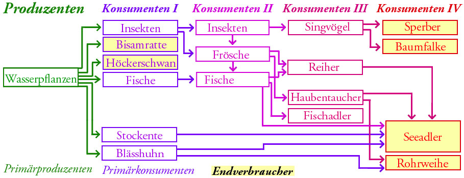 Nahrungsnetz See